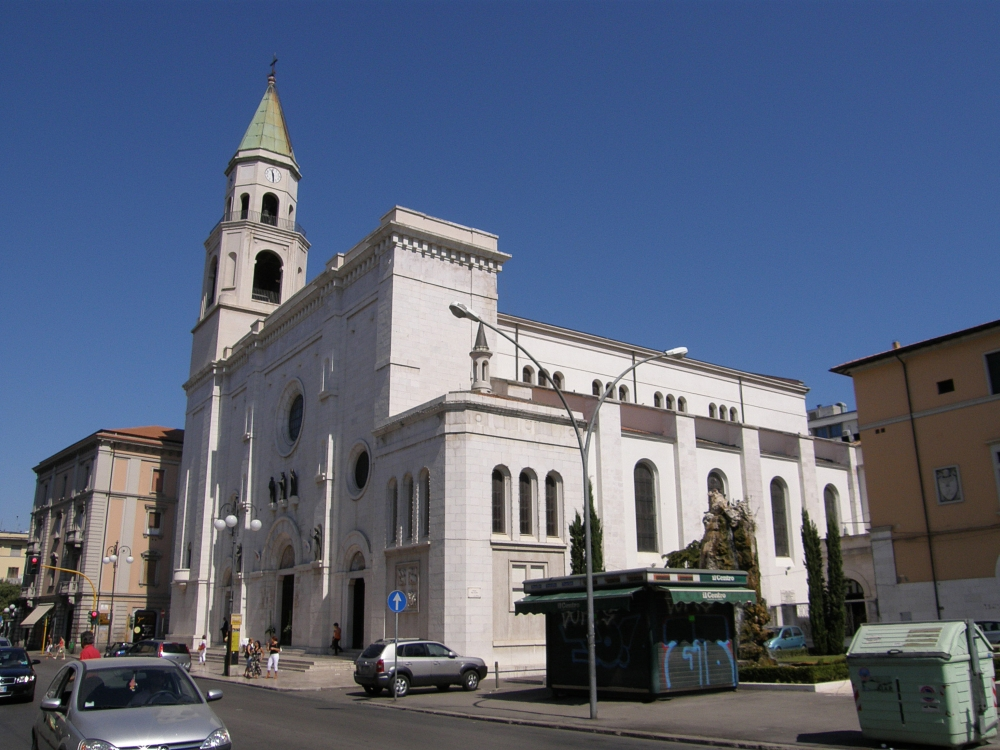 Pescara